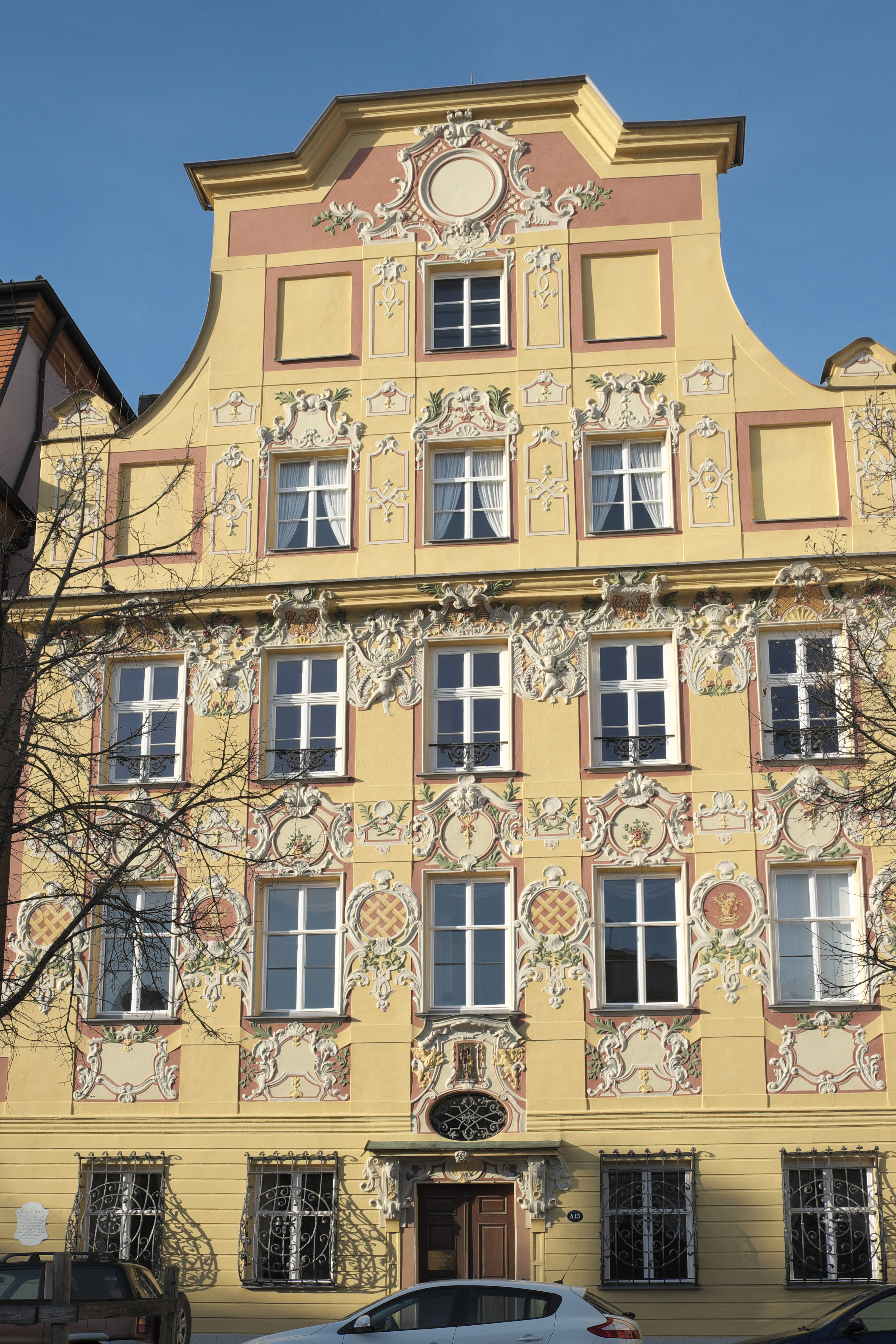 Taxishaus am Karlsplatz in Neuburg an der Donau im Landkreis Neuburg-Schrobenhausen (Oberbayern/Bayern), um 1730